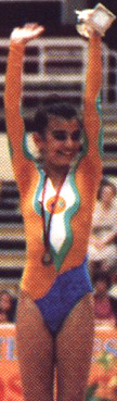 La gimnasta española Marta Baldó en el Campeonato de España Individual en Valladolid (1993)